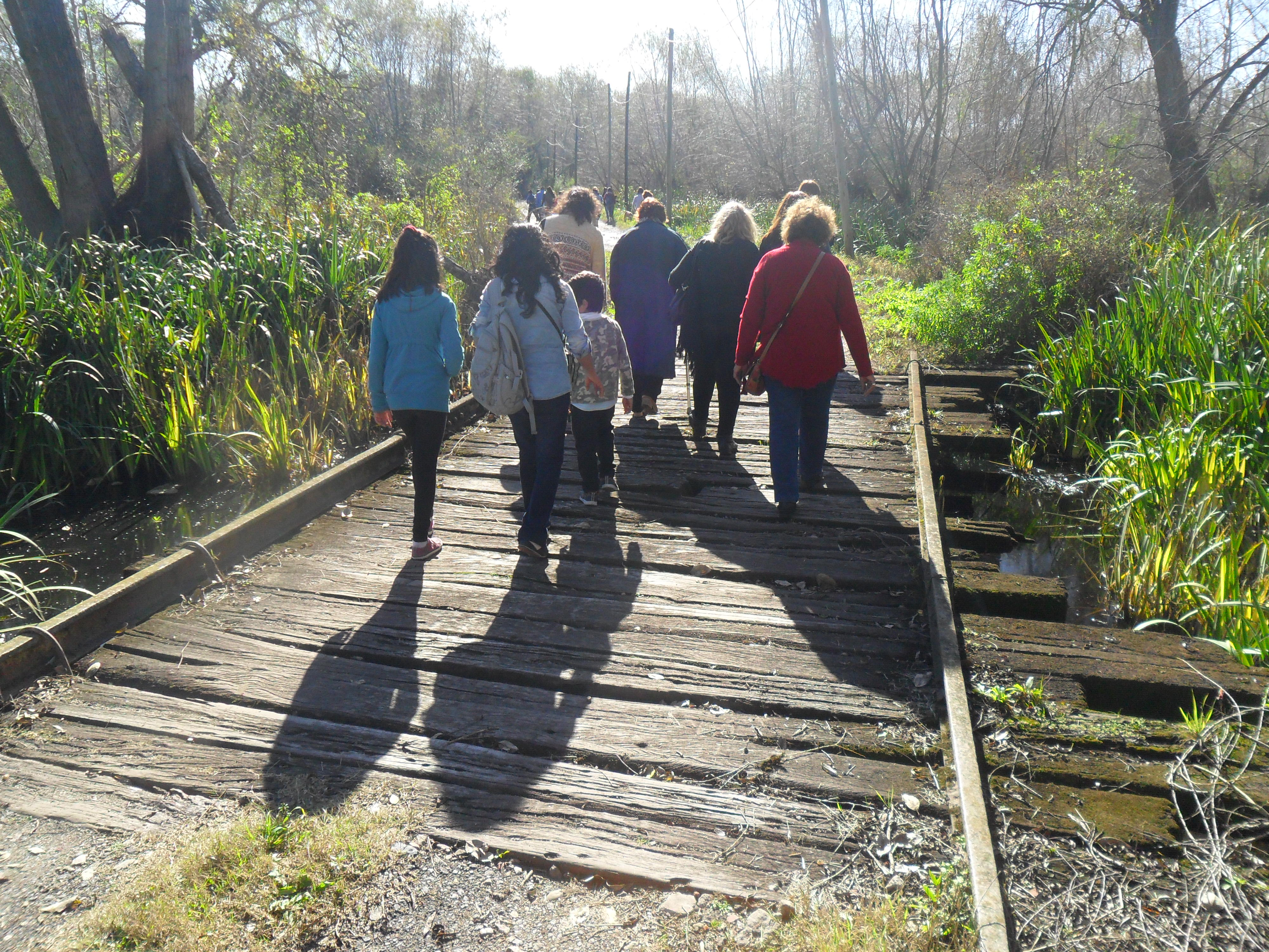 Jose Evaristo Rivarola, 59 años, UTN FRA, Villa Dominico